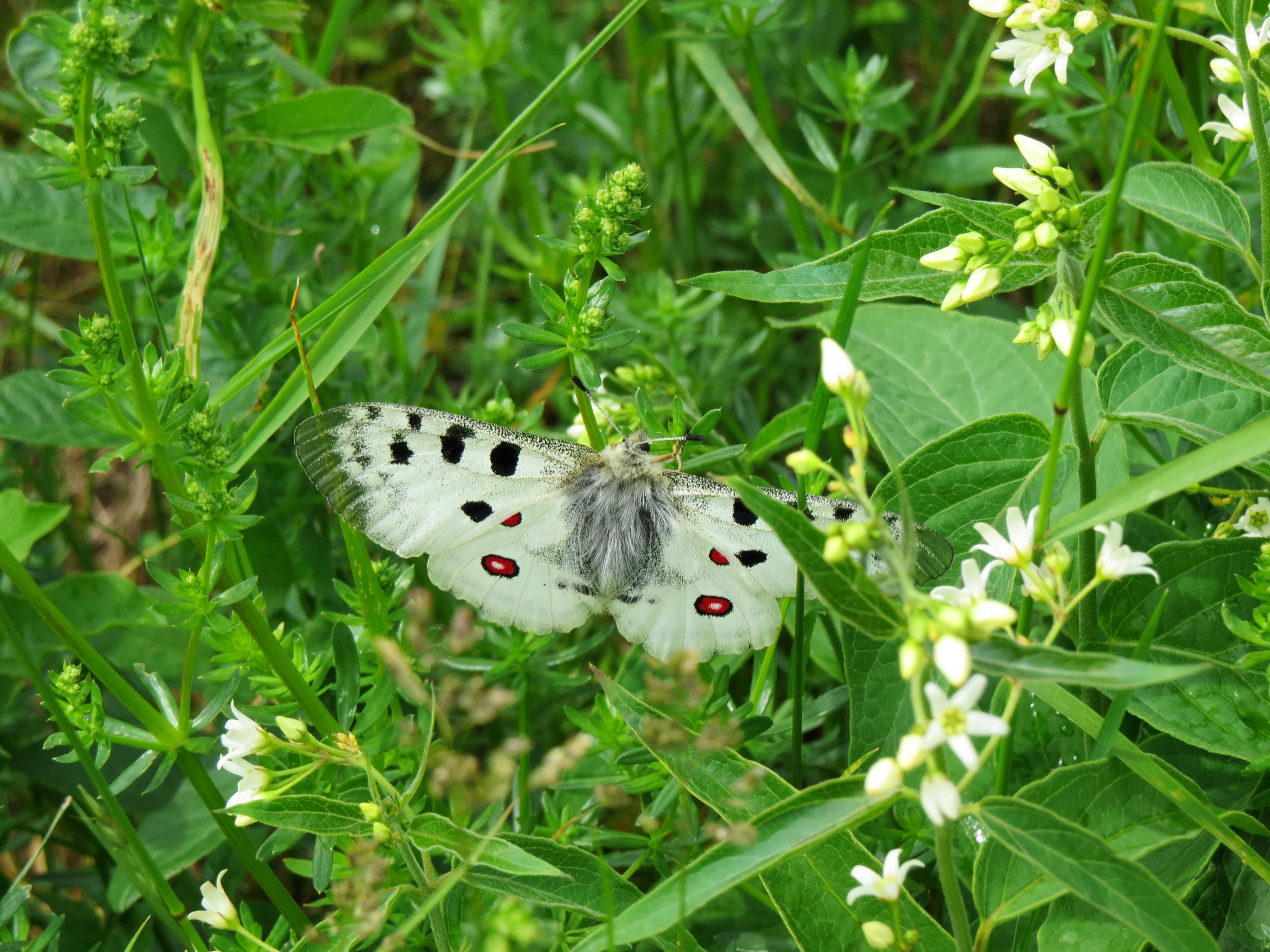 Jasoň červenooký (Parnassius apollo) u lomu v přírodní památce Kamenárka